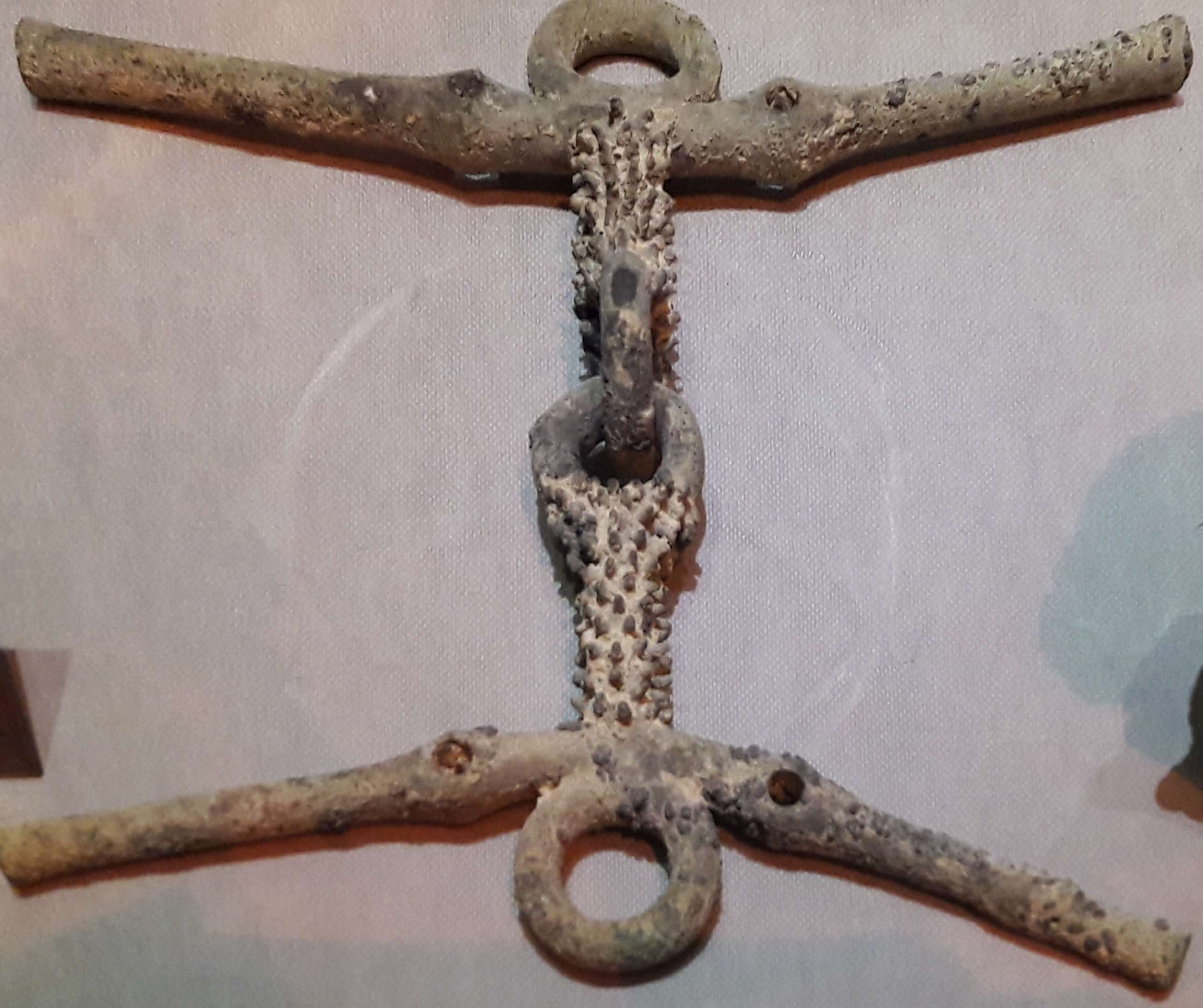 دهنه اسب احتمالا مربوط به اسبان نسایی مربوط به دوره هخامنشیان